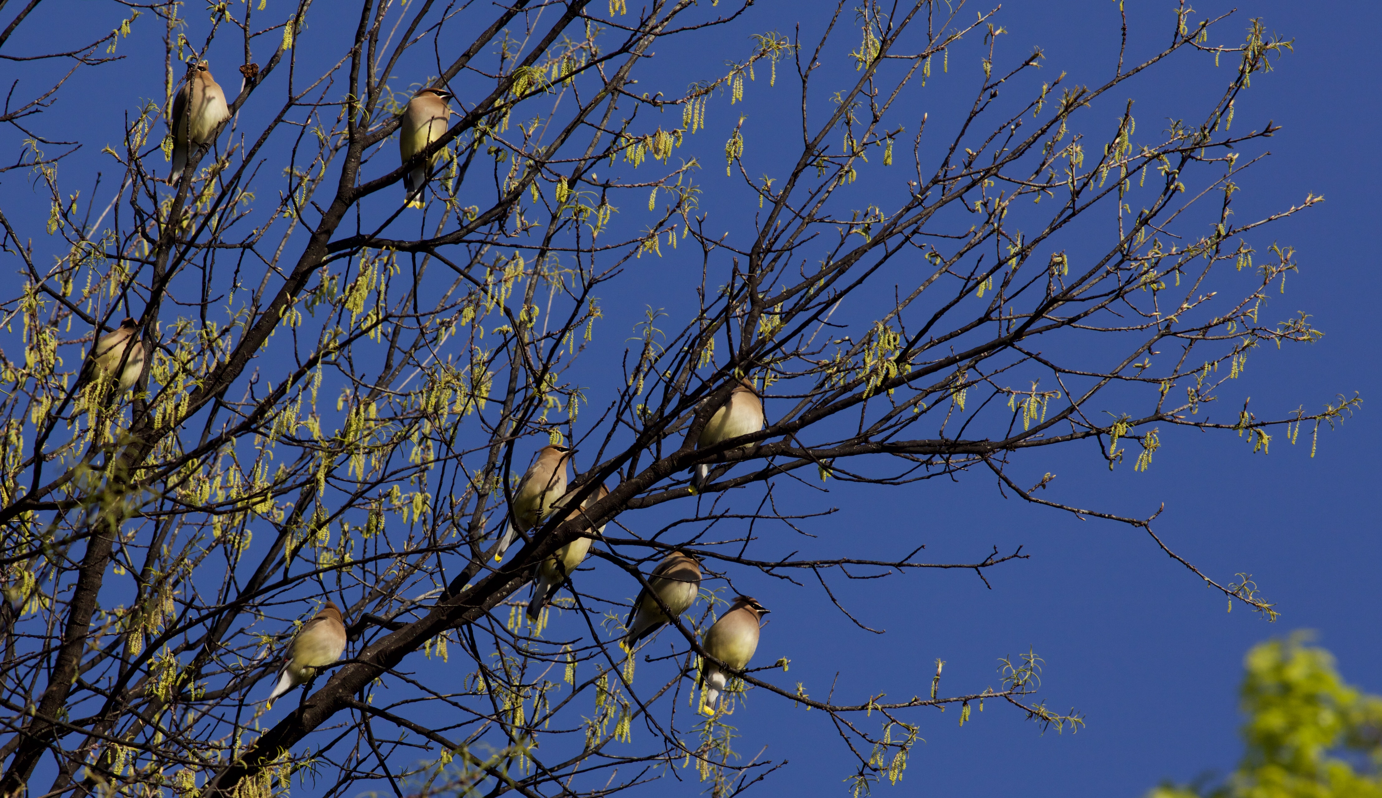 Cedar Waxwings in Birmingham, Alabama.